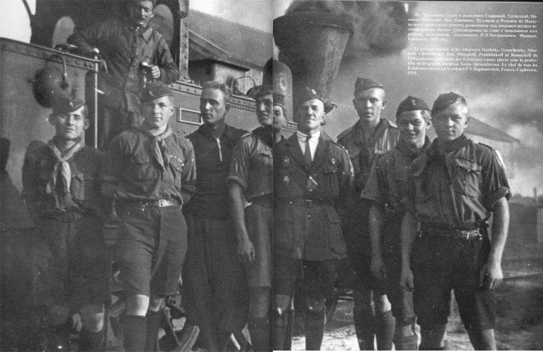 На фото вверху: Полковник Сулин и разведчики Старицкий, Грушецкий, Никонов, Бек, Олимпиев, Пухляков и Ромашов из Национальной организации русских скаутов разведчиков под покровительством великой княгини Ксении Александровны во главе с начальников всех русских разведчиков, полковником П.Н. Богдановичем. Франция, Капбретон, 1931 г.